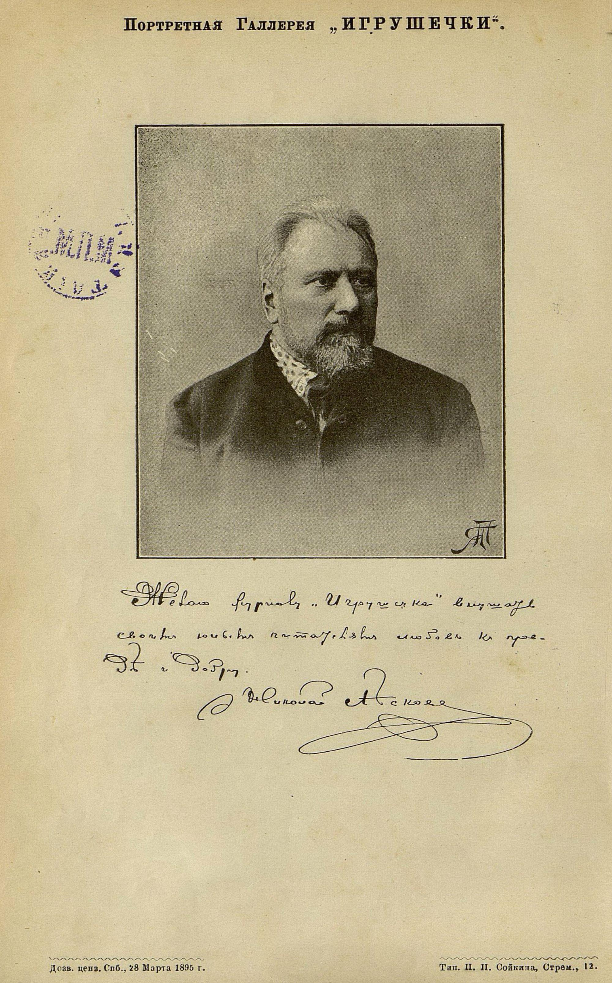 Фотография Н. С. Лескова с посвящением журналу "Игрушечка"